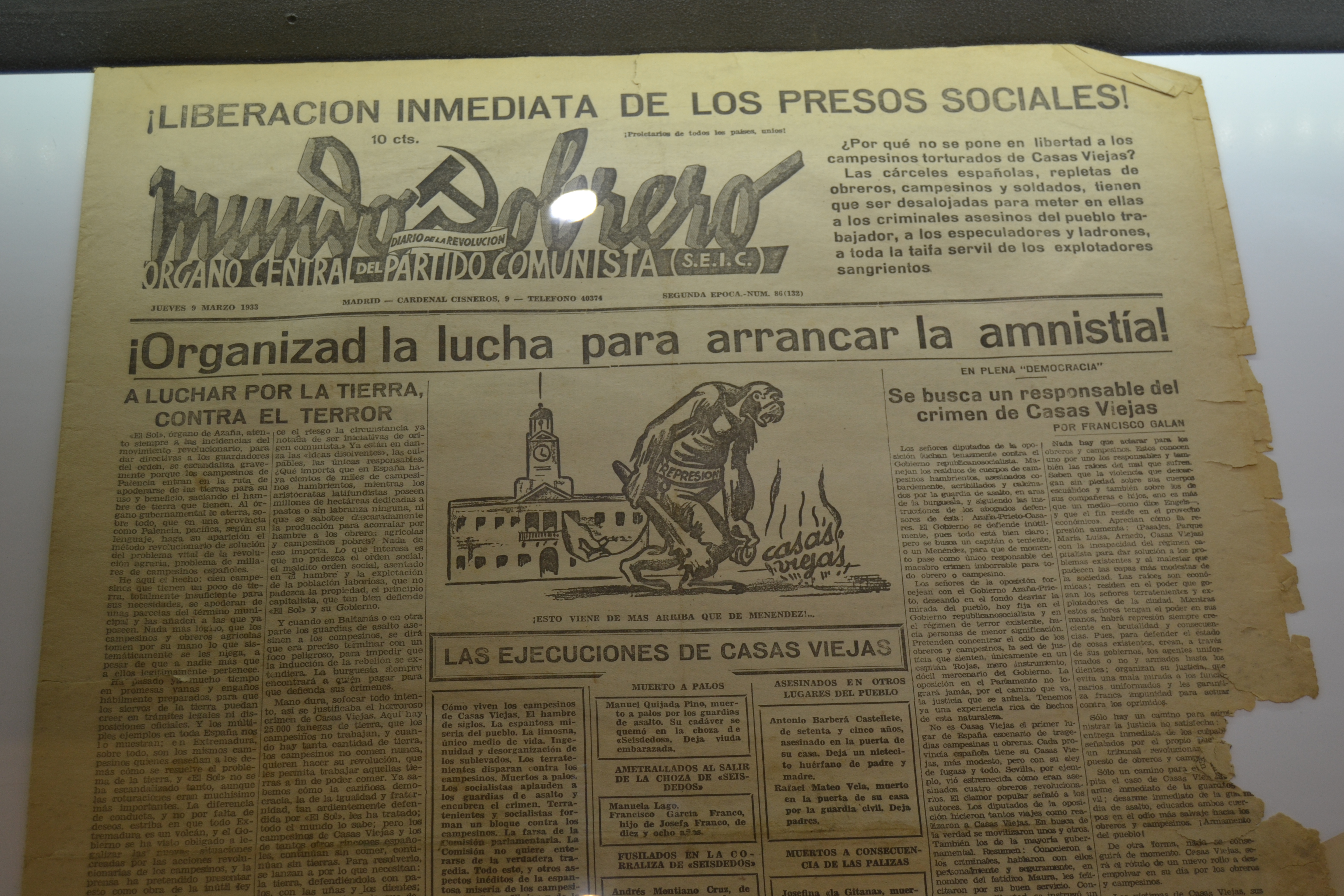 Exposición 40 años de Comisiones Obreras, Valladolid, España